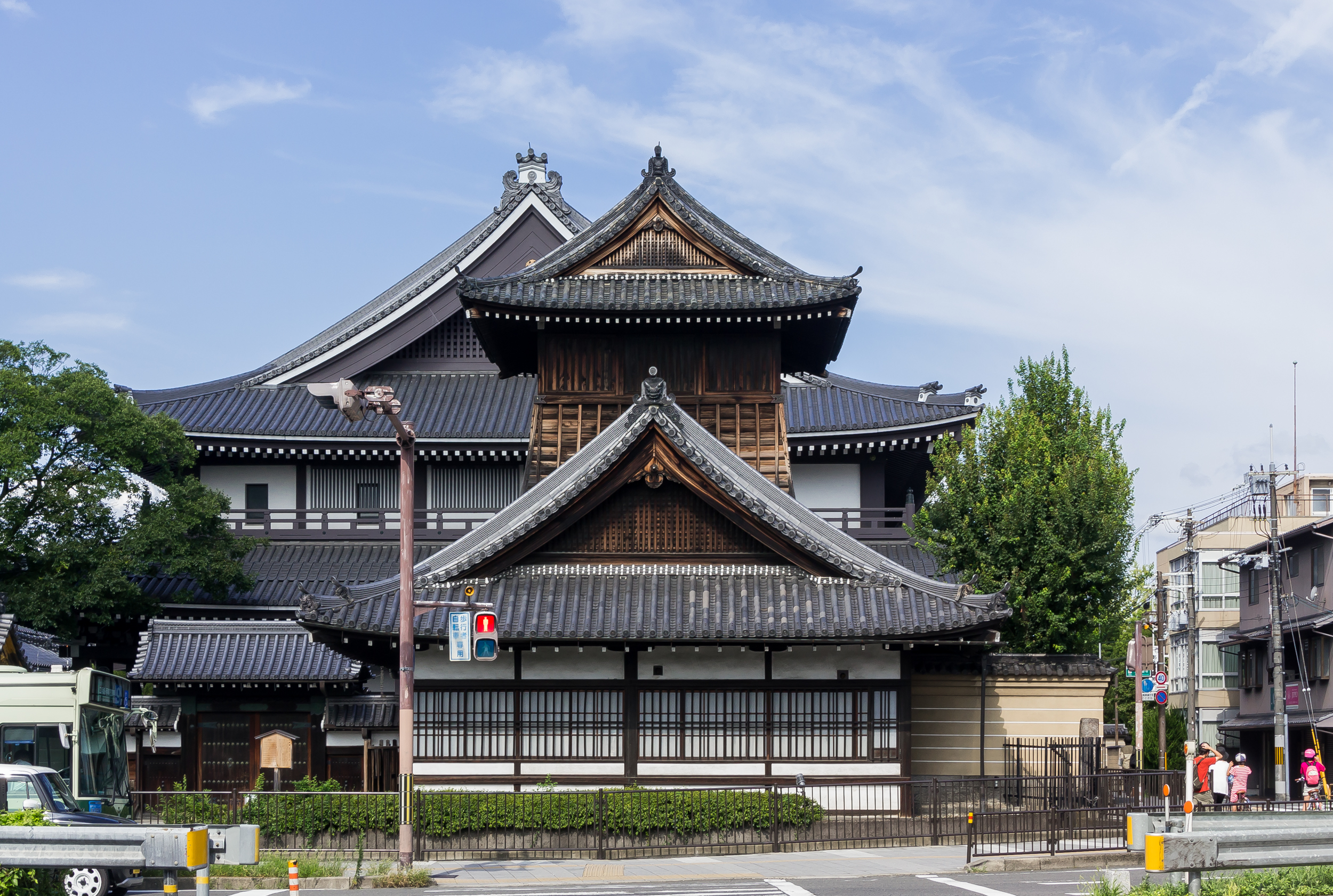 西本願寺 太鼓楼 (重要文化財)